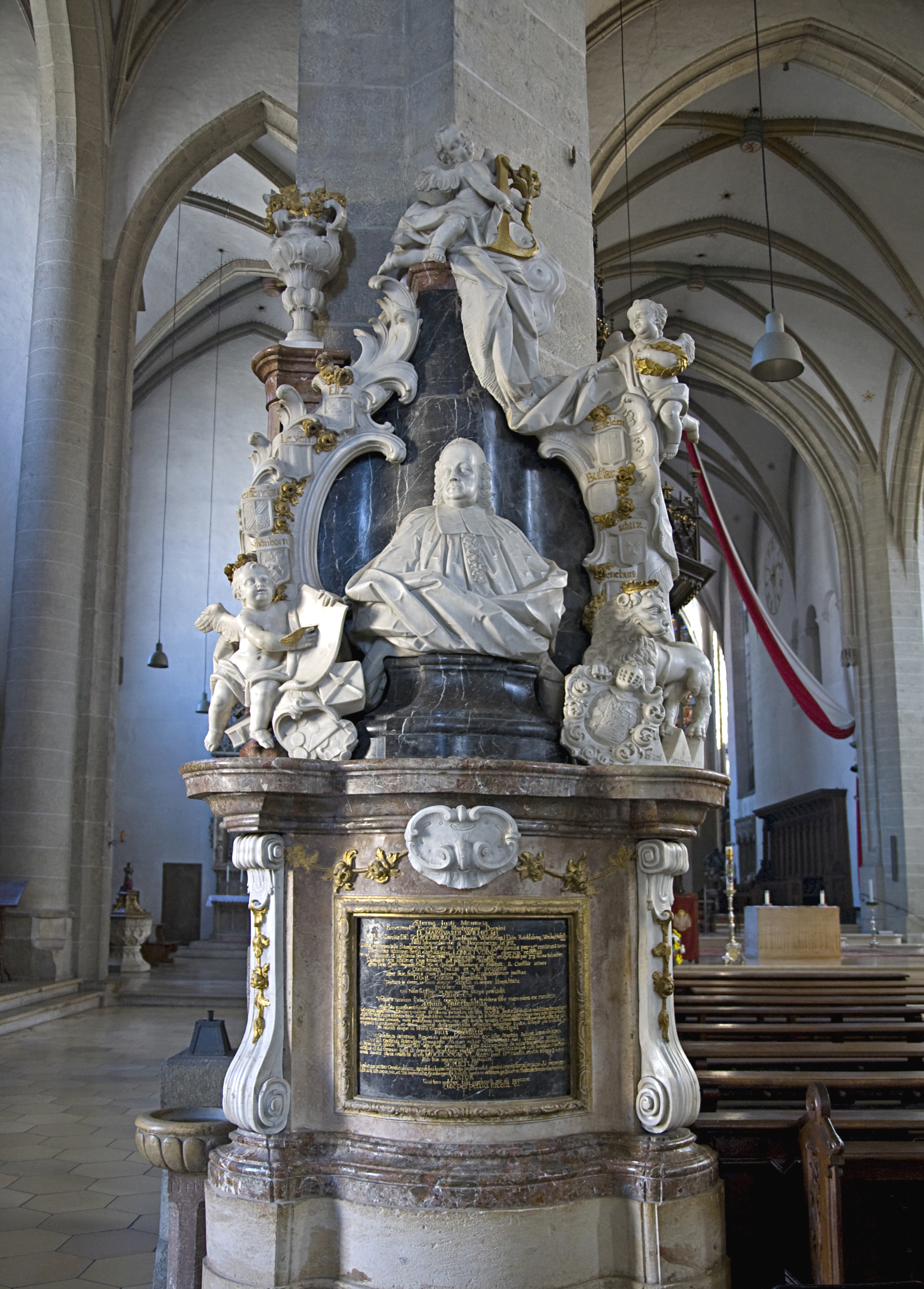 Denkmal zu Ehren von Dompropst Marquard Wilhelm Graf von Schönborn im Dom zu Eichstätt